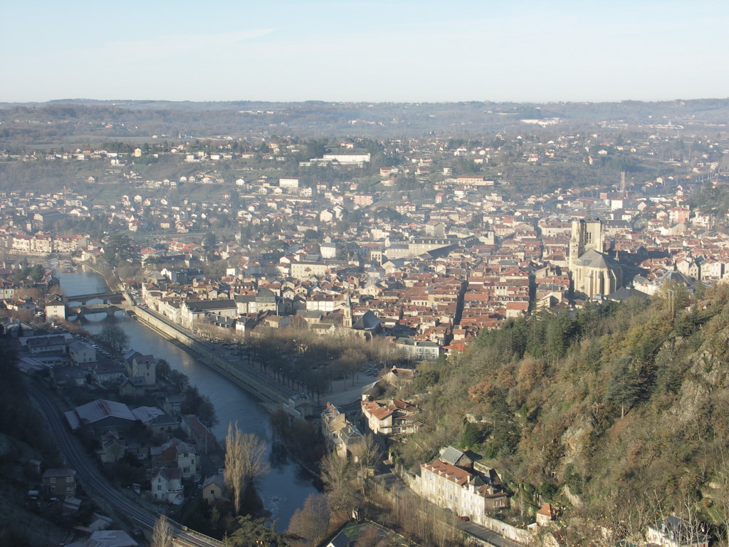 Vue_Villefranche-de-Rouergue_271206.jpg